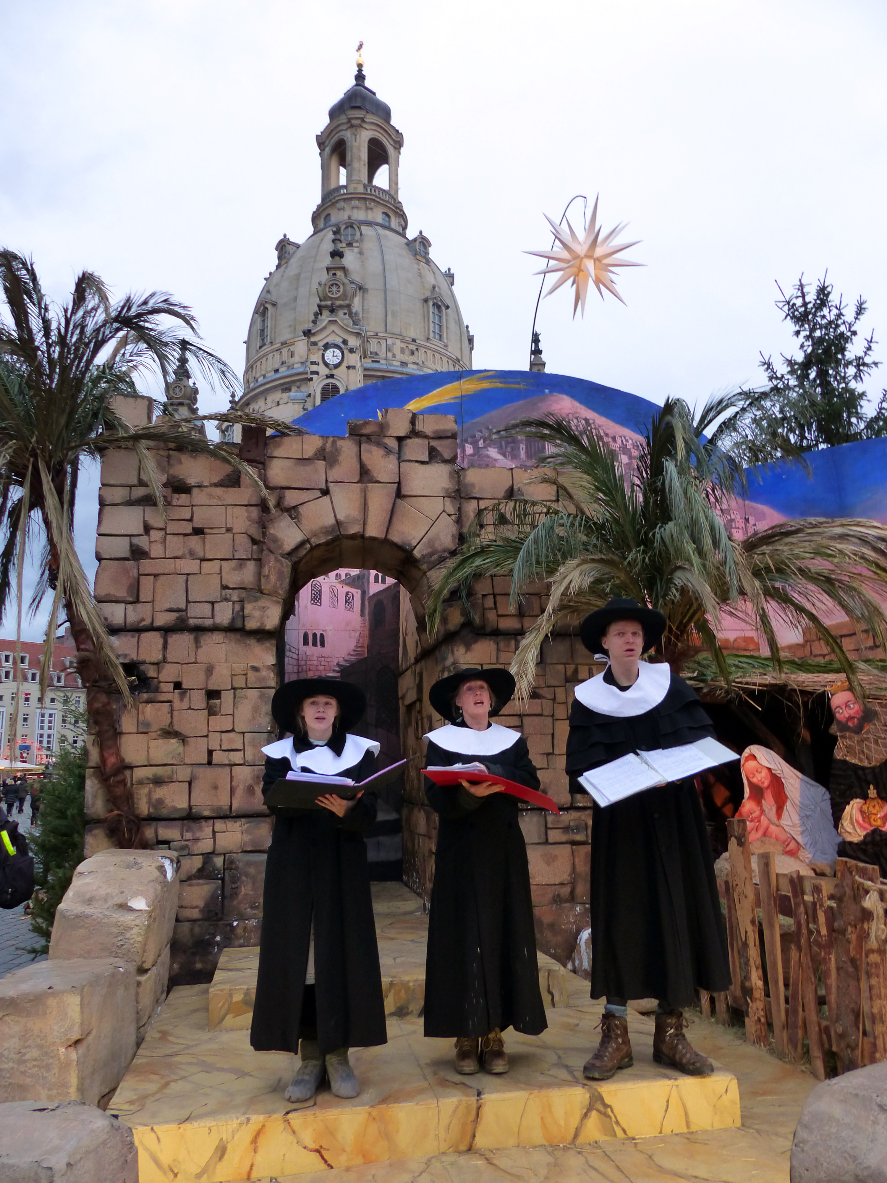 Kurrende vor der Weihnachtskrippe auf dem Neumarkt vor der Frauenkirche in Dresden